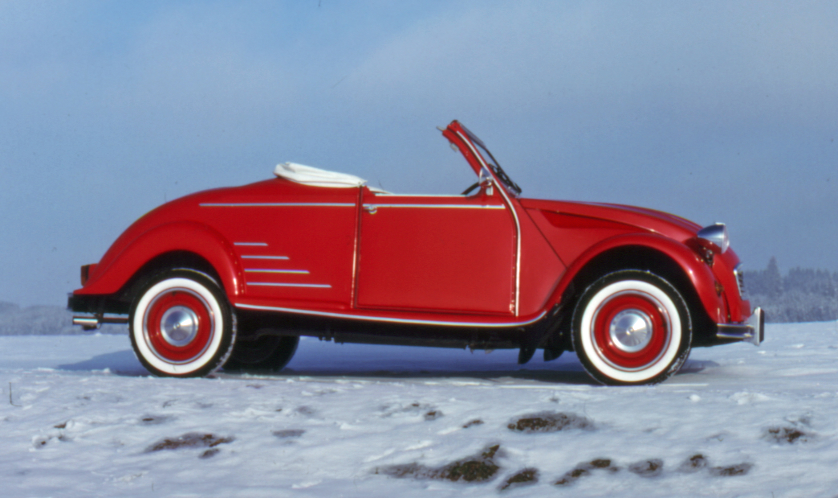 hoffmann2cv cabrio